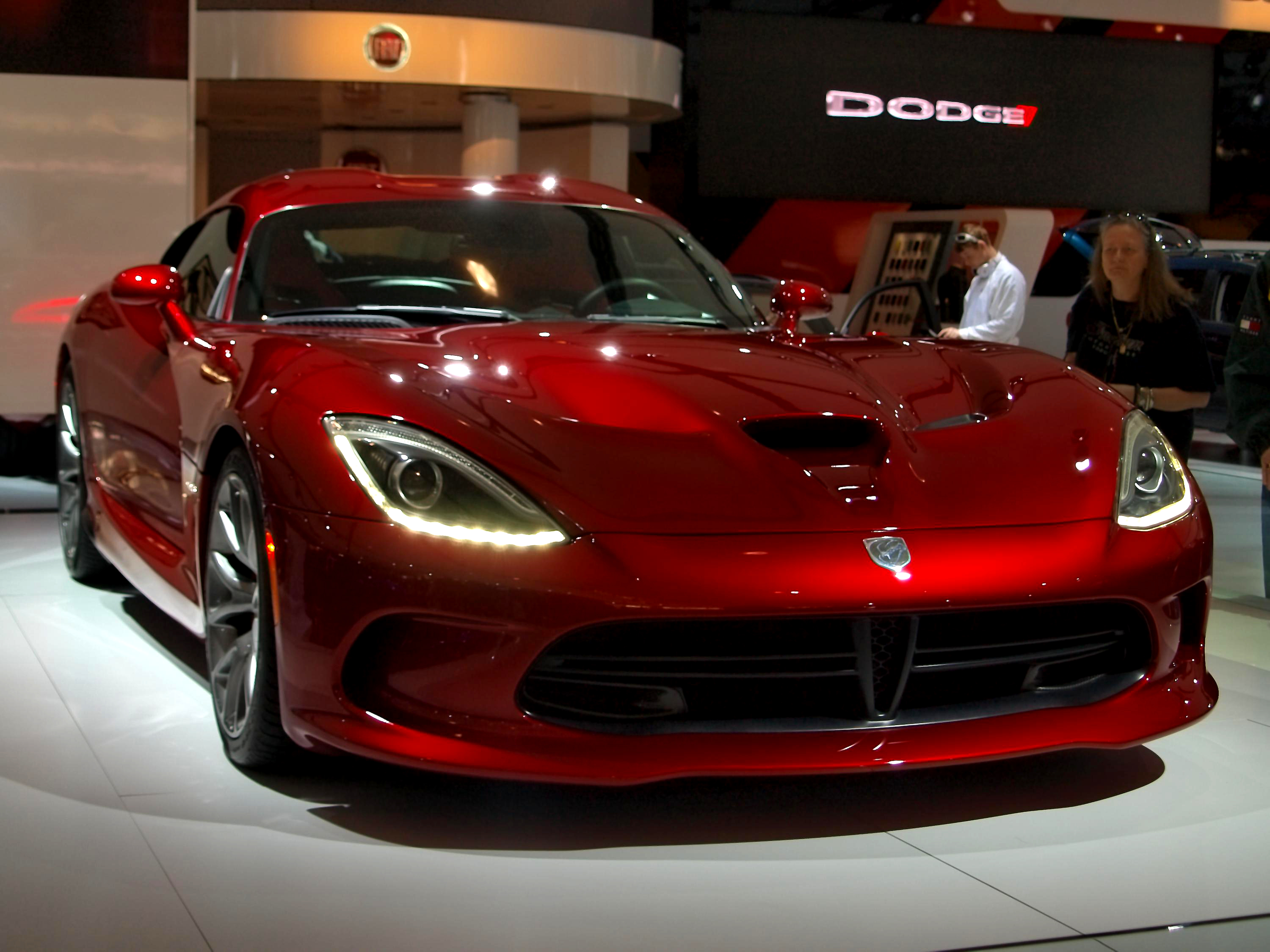 La super-sportiva SRT Viper del gruppo Fiat-Chrysler